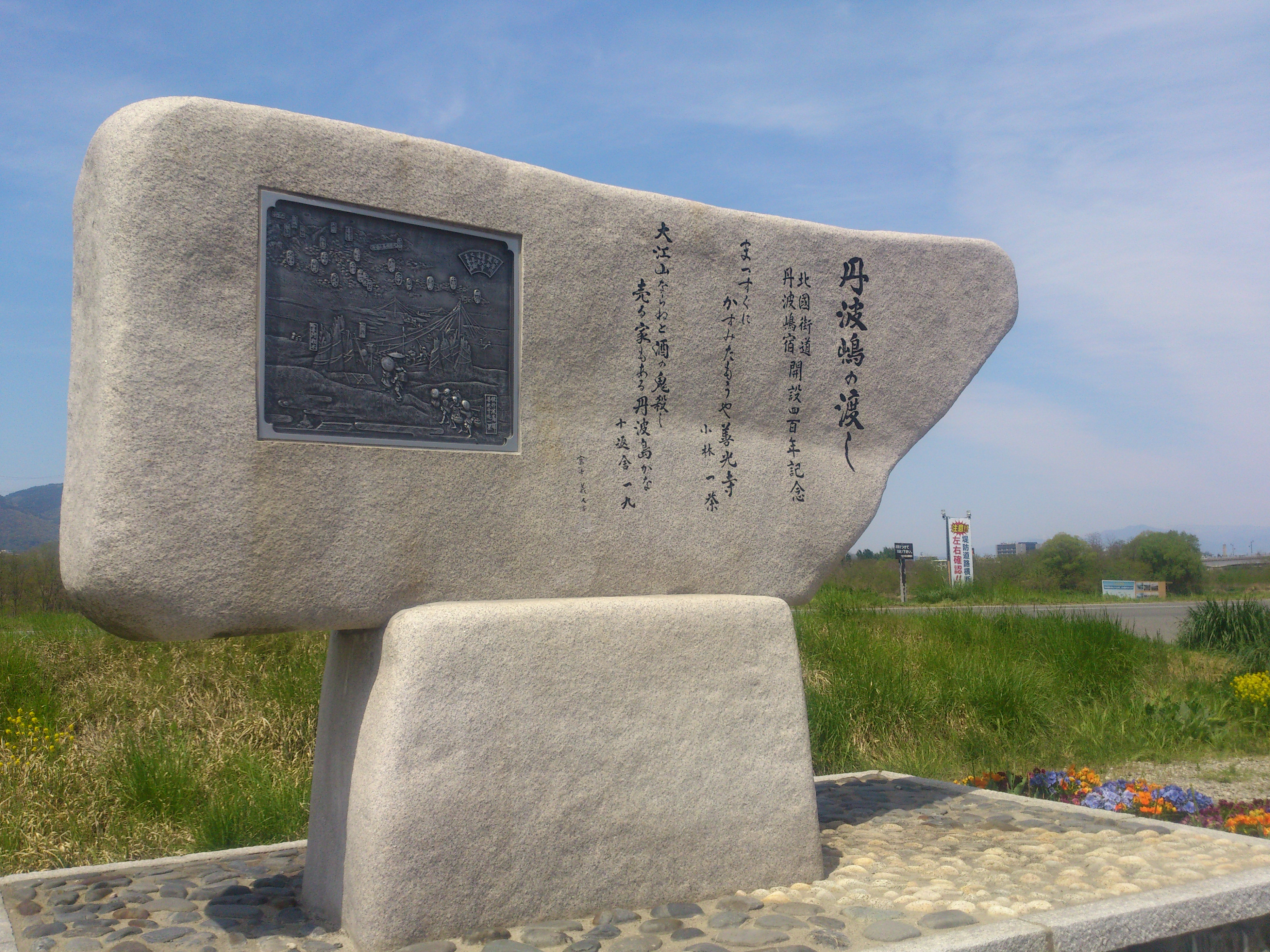 旧北国街道 丹波島の渡し跡（長野県長野市丹波島三丁目）